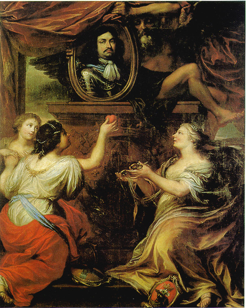 Ranuccio II Farnese, Duke of Parma and Piacenza and Duke of Castro, son of Odoardo I Farnese, Duke of Parma and Piacenza, and Margherita Medici, father of Odoardo II Farnese, Duke of Parma and Piacenza, as portrayed in: Il Tempo mostra il ritratto di Ranuccio II alle figure allegoriche di Parma, Piacenza e Castro; Parma, Galleria Nazionale.